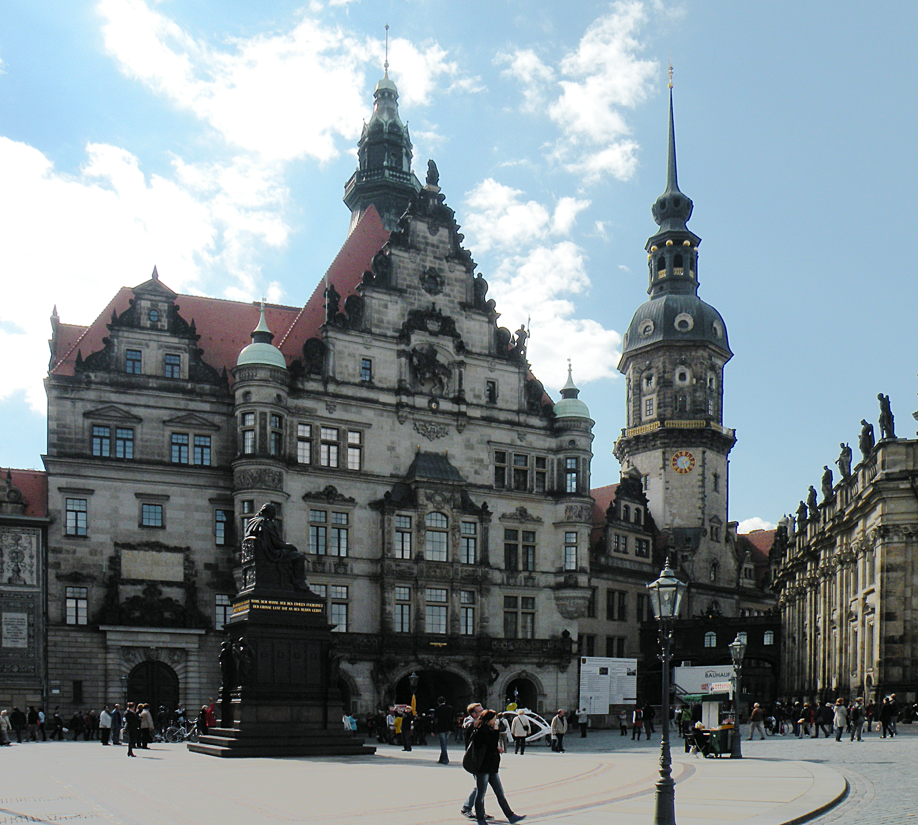 Georgentor am Schlossplatz (Dresden}